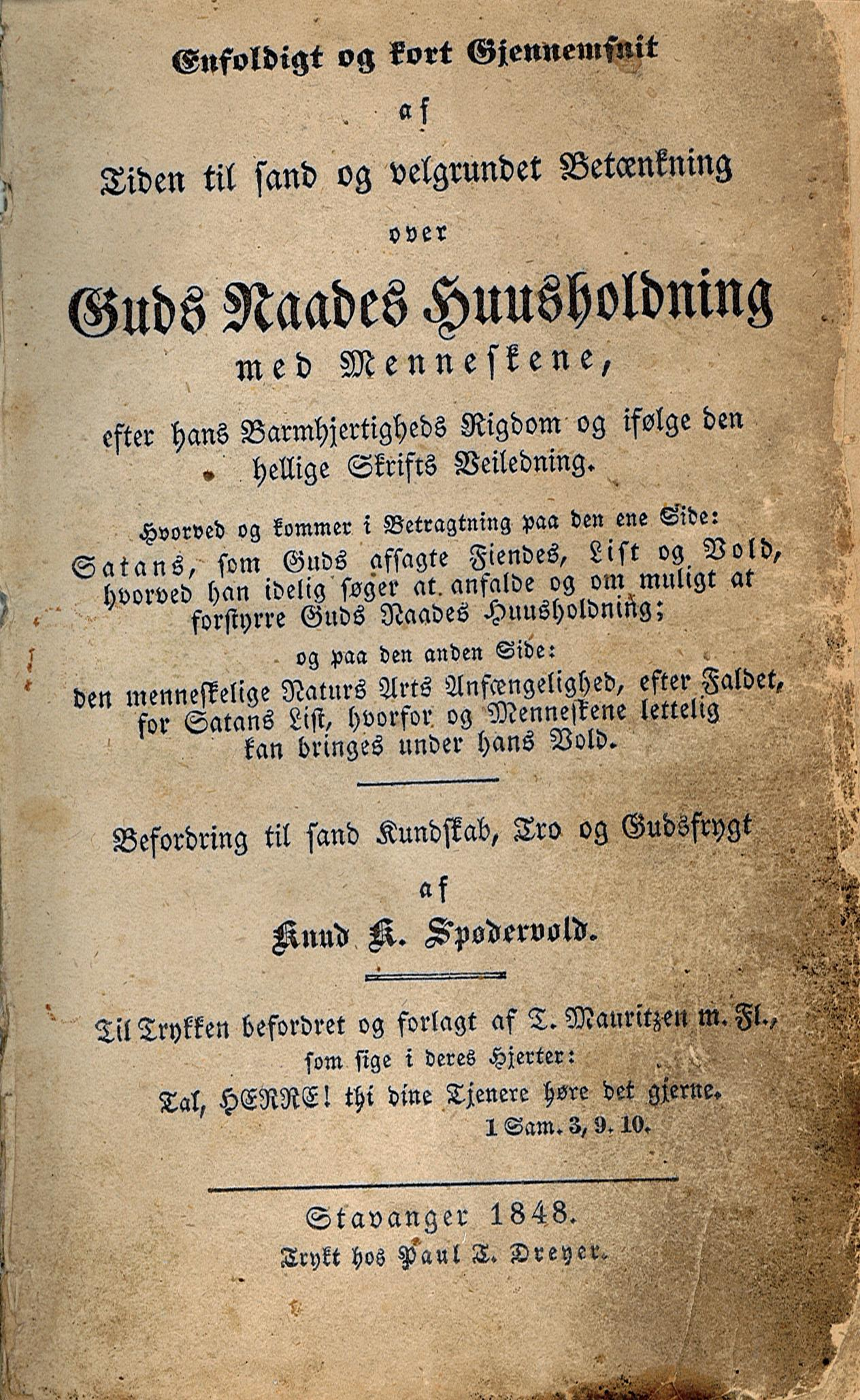 Fotografi av originalbok